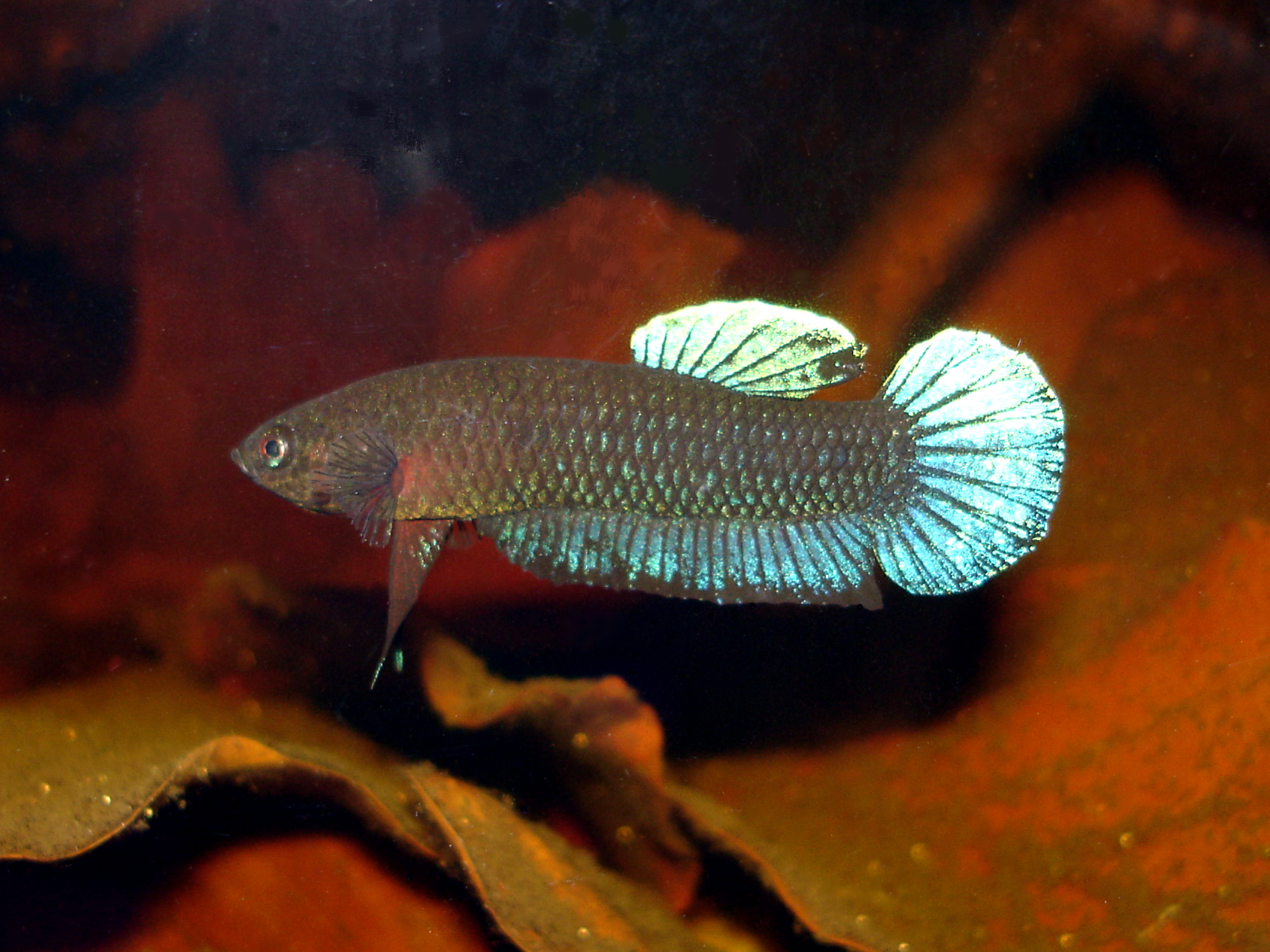 Male Betta persephone from Ayer Hitam